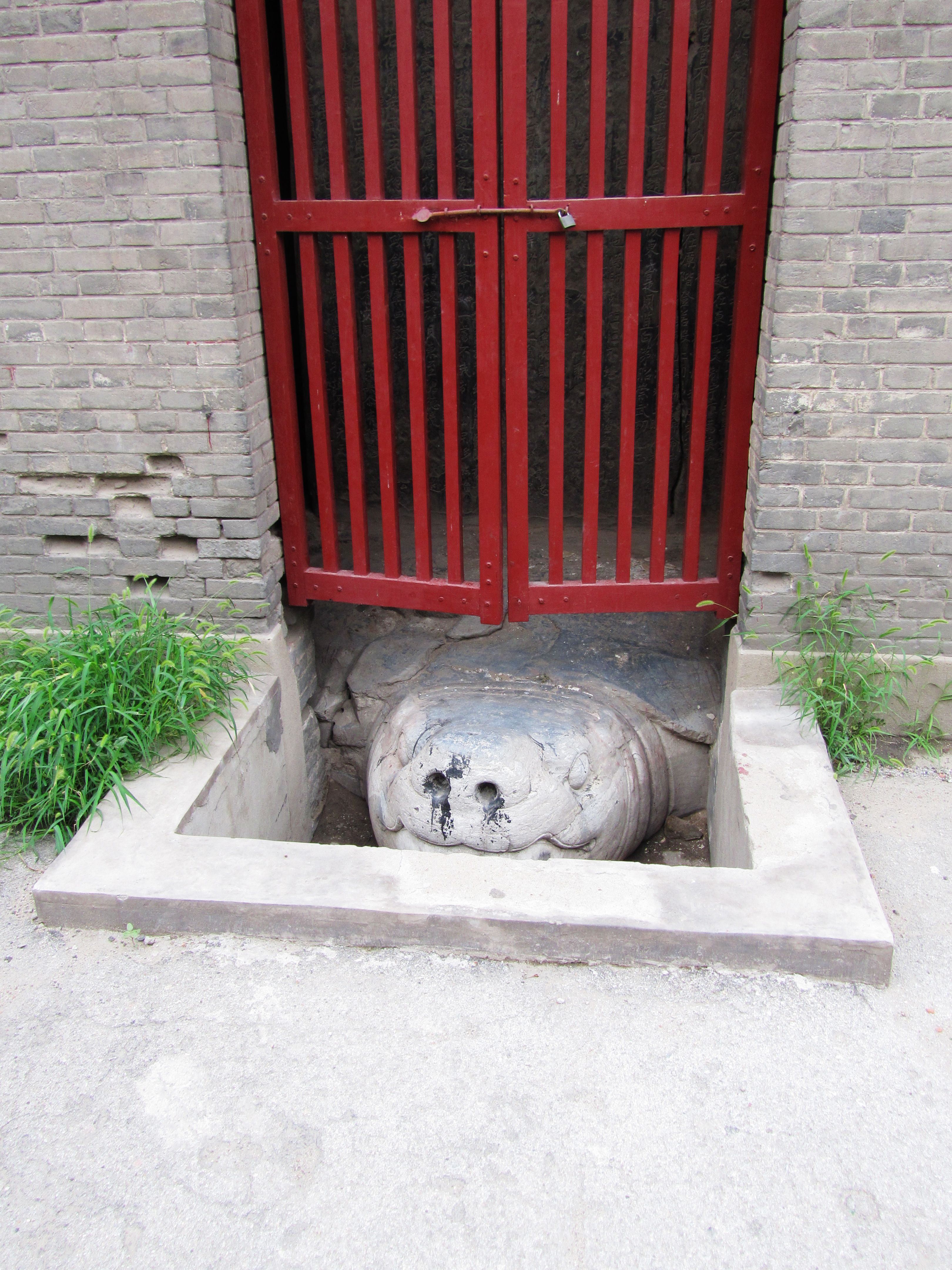 正定县大唐清河郡王纪功载政之颂碑，龟趺。